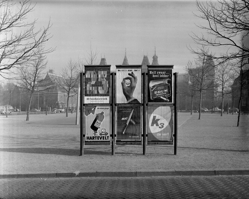 Reclameborden met affiches voor de 25ste Boekenweek, Amstel Bier, Drum, Hartevelt (van Frans Mettes), Bic en K3, Museumplein, Amsterdam, 12 maart 1960 Foto Ben van Meerendonk / AHF, collectie IISG, Amsterdam